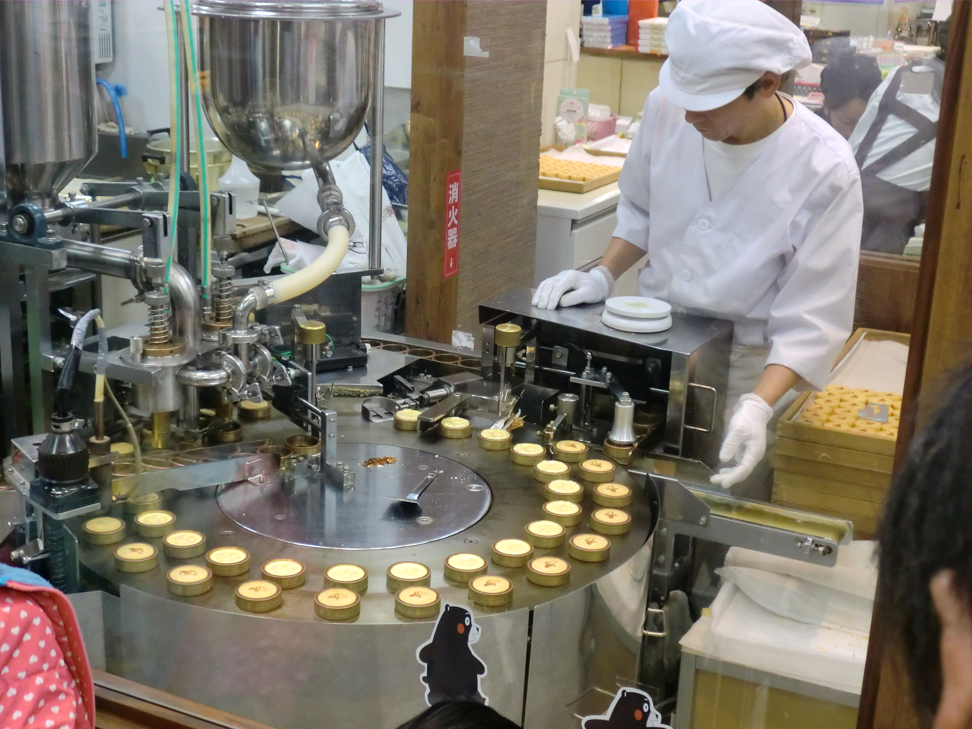 熊本市中央区にある県民百貨店（最終日）